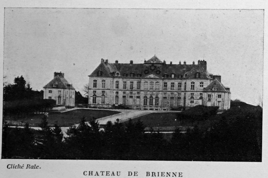 publié dans le "Bulletin de l'œuvre des voyages scolaires".